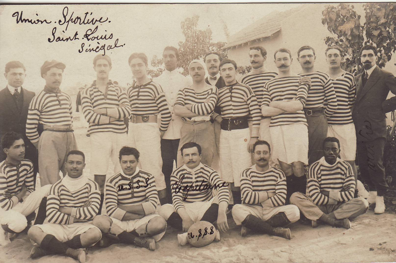 Rugby Union Sportive Saint-Louis Sénégal 1911 (carte postale)